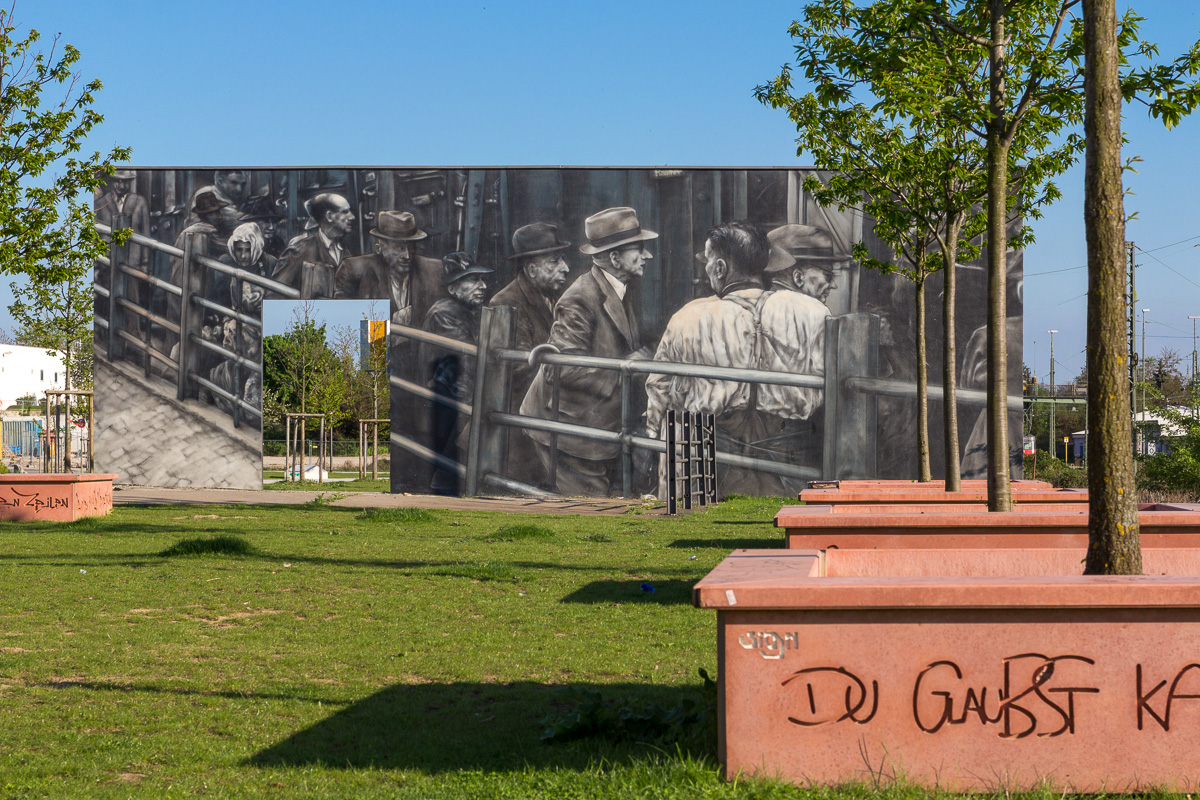 Gedenkort Schlachthoframpe am Wiesbadener Bahnhof.